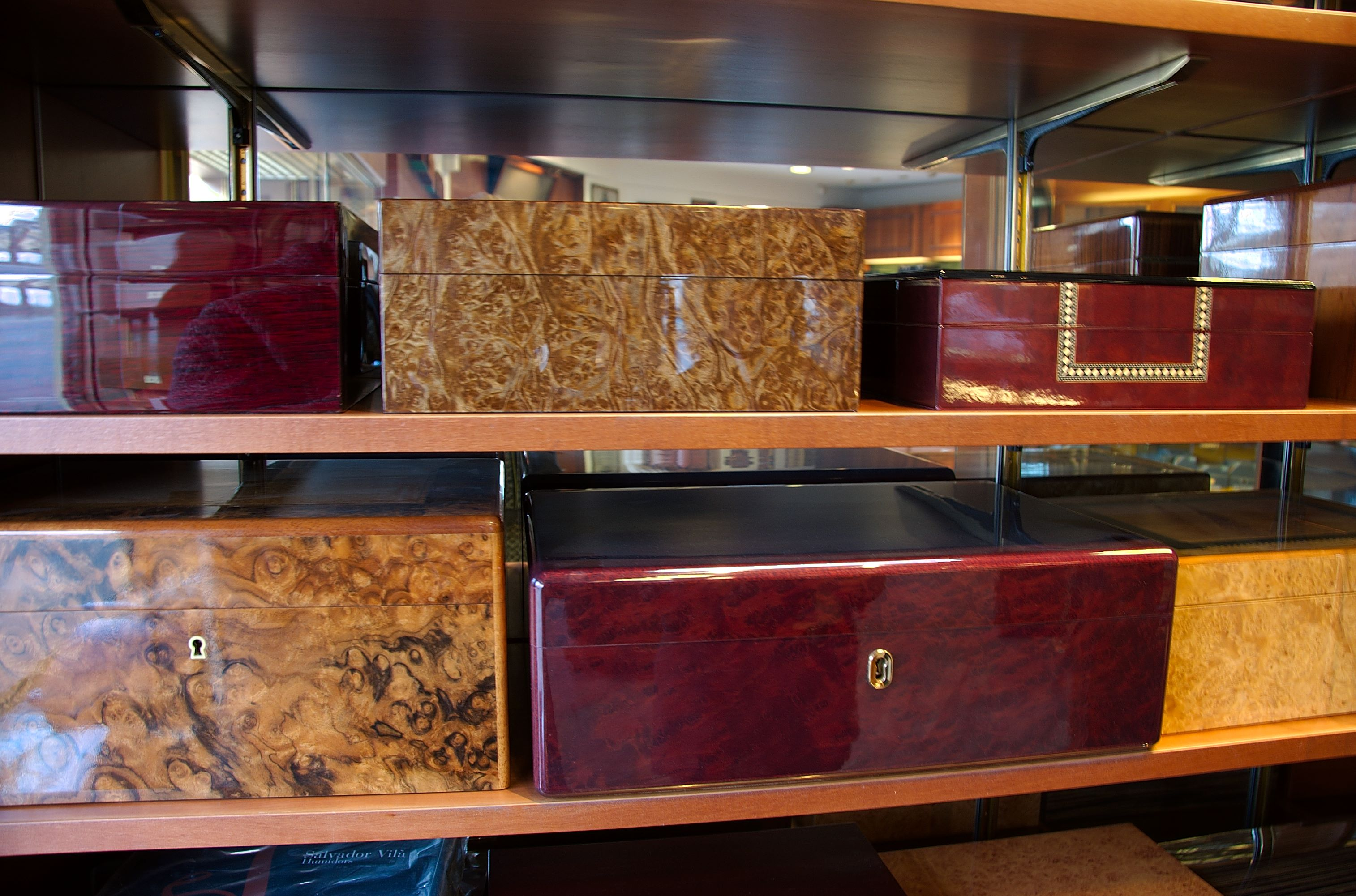 Sol Cigar Co, spesialforretning innen tobakk, grunnlagt i 1911. Adresse Henrik Ibsens gate 28 i Oslo. Håndlagede humidorer til oppbevaring av cigarer